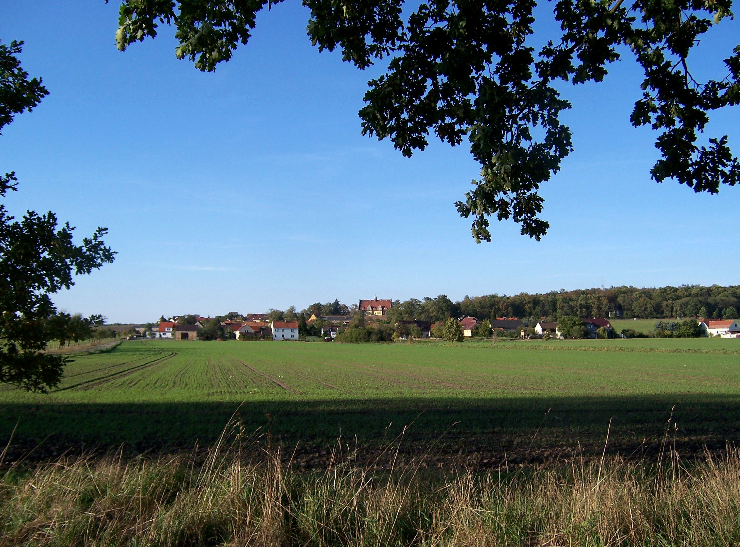 Weißig (Ortsteil von Oßling in Sachsen), Ortsansicht von Süden